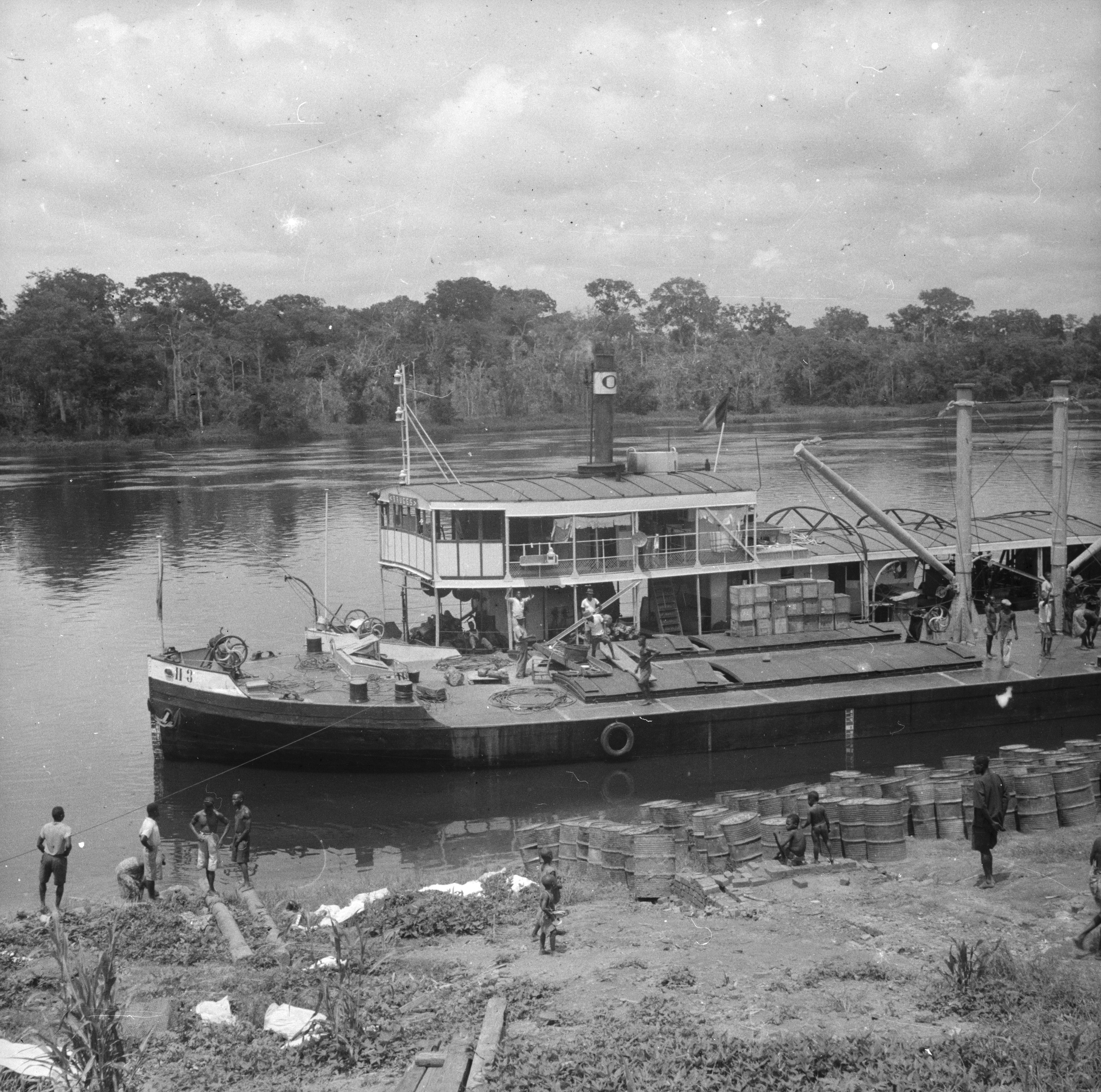 Belgisch-Kongo, Molanda (Malanda): Schiff; Schiff mit Palmölladung auf dem Fluss Mongala